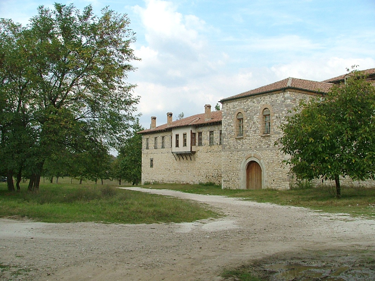 Arapovo Monastery near Asenovgrad, Bulgaria Exterior view This file, which was originally posted to , is licensed under Creative Commons Attribution 2.5 License. Attribution: Peter Georgiev In short: you are free to distribute and modify the file as long as you attribute its author(s) or licensor(s).Check for other images from this website. Този файл, оригинално качен на сайта , е лицензиран под условията на лиценза Creative Commons Признание 2.5. Признание: Peter Georgiev Накратко: имате свободата да разпространявате и променяте файла, стига да посочвате неговия (неговите) автор(и) или лицензодател(и).Разгледайте други картинки от този уебсайт.